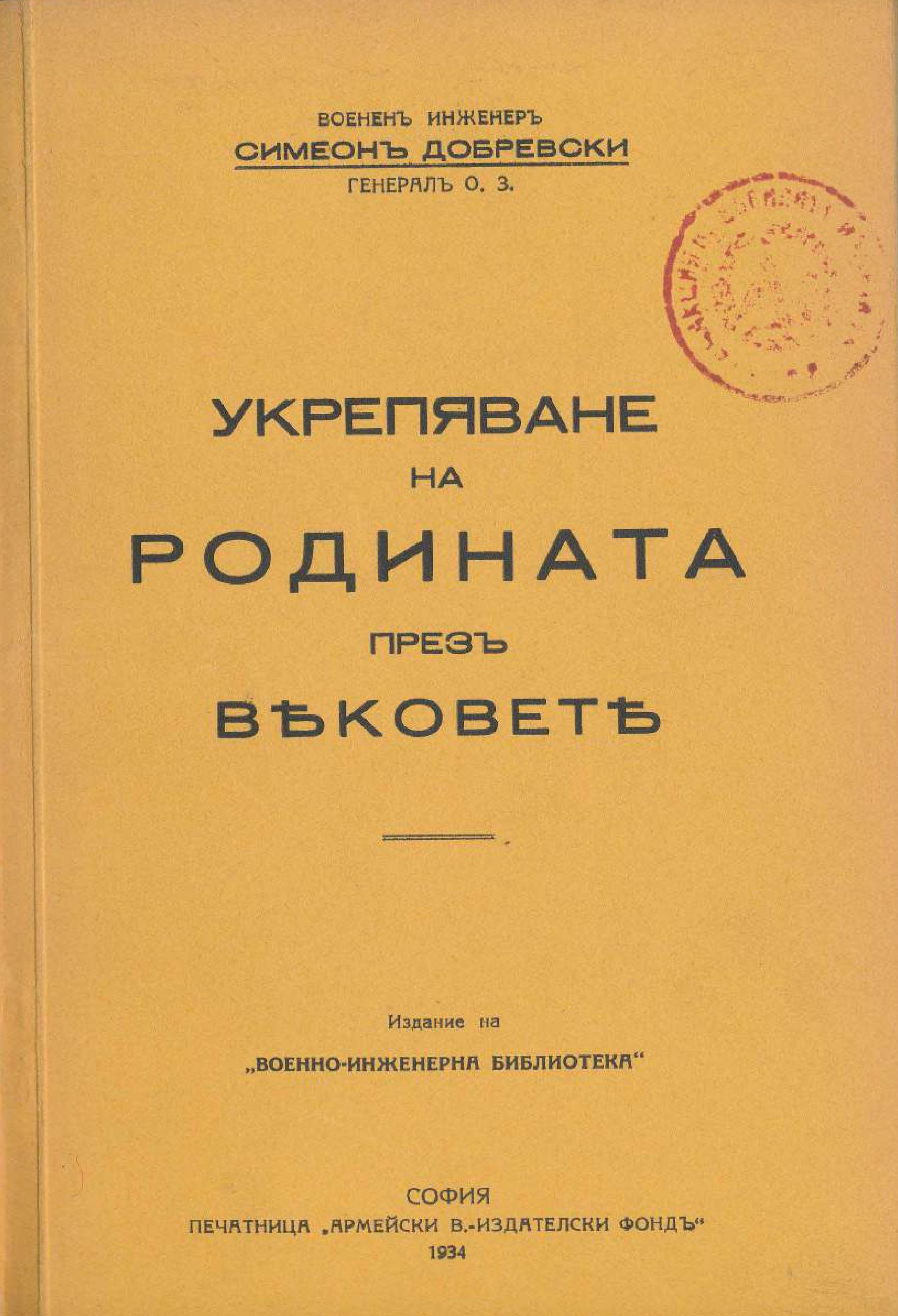 Укрепяване на родината през вековете